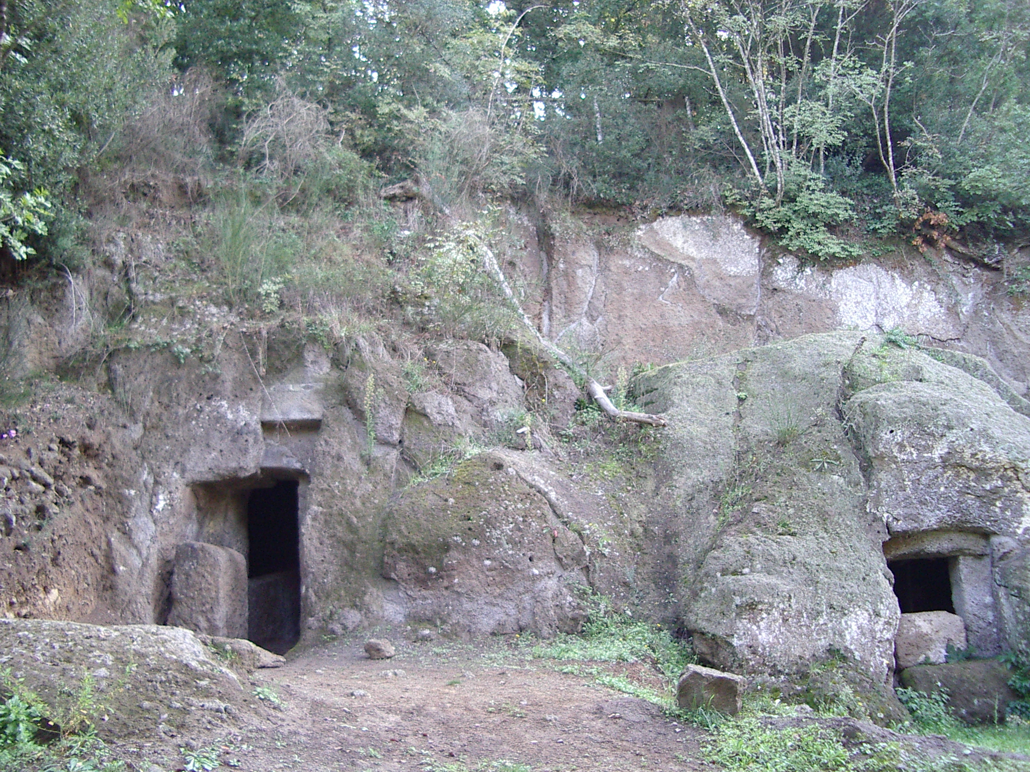 Nécropole étrusque de Pian di Mola : tombe rupestre à dado type à casa